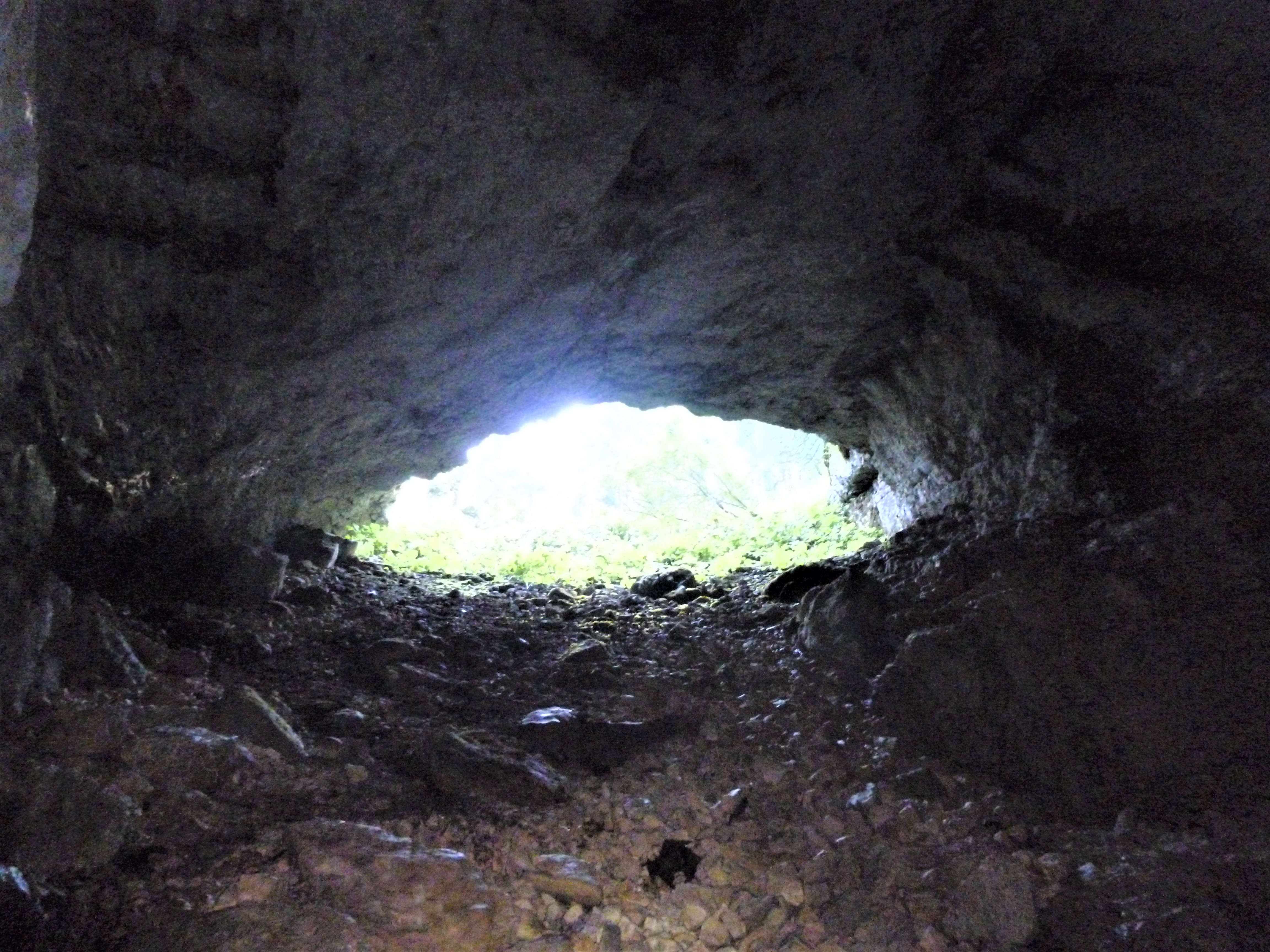 Ancienne perte glaciaire, la galerie d'entrée du scialet de la Combe de Fer plonge comme un toboggan jusqu'à 90 m de profondeur.